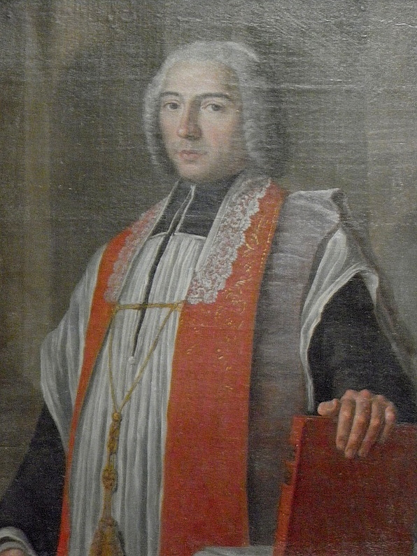 Jean-Denis-Cochin, curé de Saint-Jacques-du-Haut-Pas à Paris au XVIIIe. Tableau sis dans l'église Saint-Jacques-du-Haut-Pas à Paris (75).